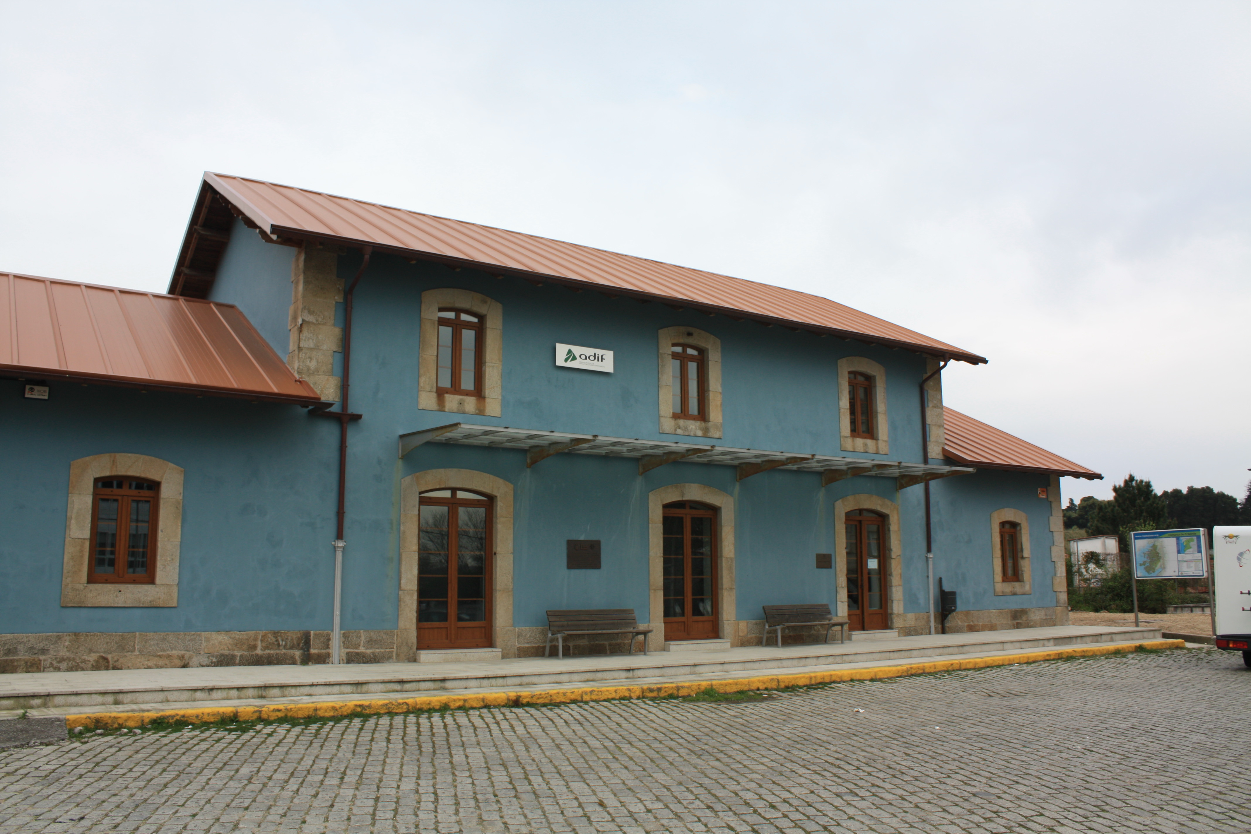 Antiga estación de tren do Carril (Vilagarcía de Arousa), reconvertida en 2006 no Museo do Ferrocarril